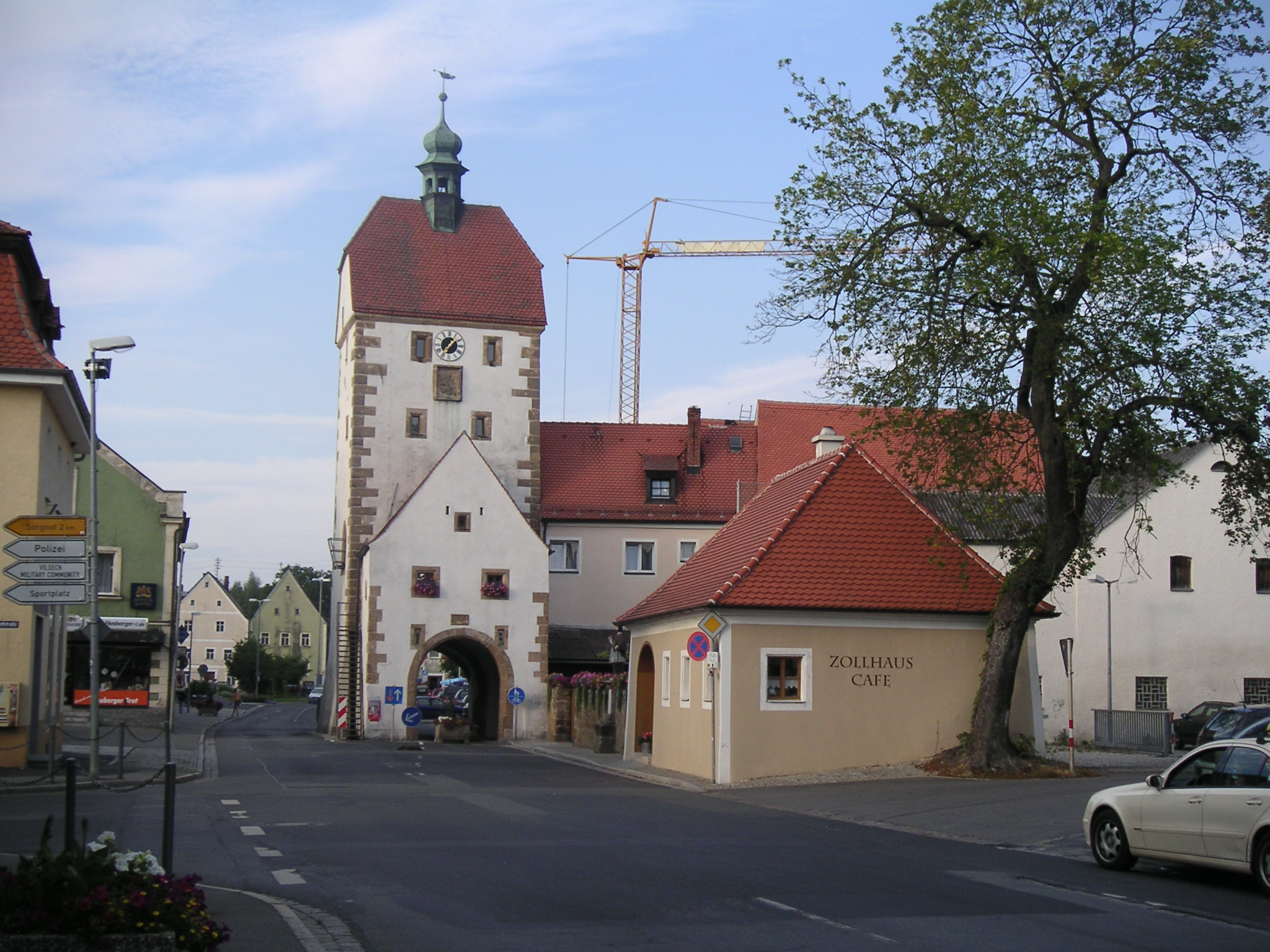 Vogelturm in Vilseck, der das Türmermuseum beherbergt - Südseite.